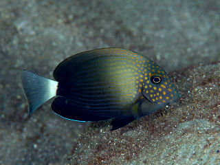 Acanthurus maculiceps en Japón